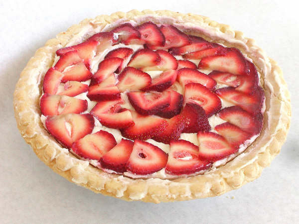 Strawberry cheese pie, สตรอเบอร์รี่ชีสพาย พายที่ไส้ในเป็นครีมชีสกับสตรอเบอร์รี่ ที่ร้าน DiSalvo's Deli